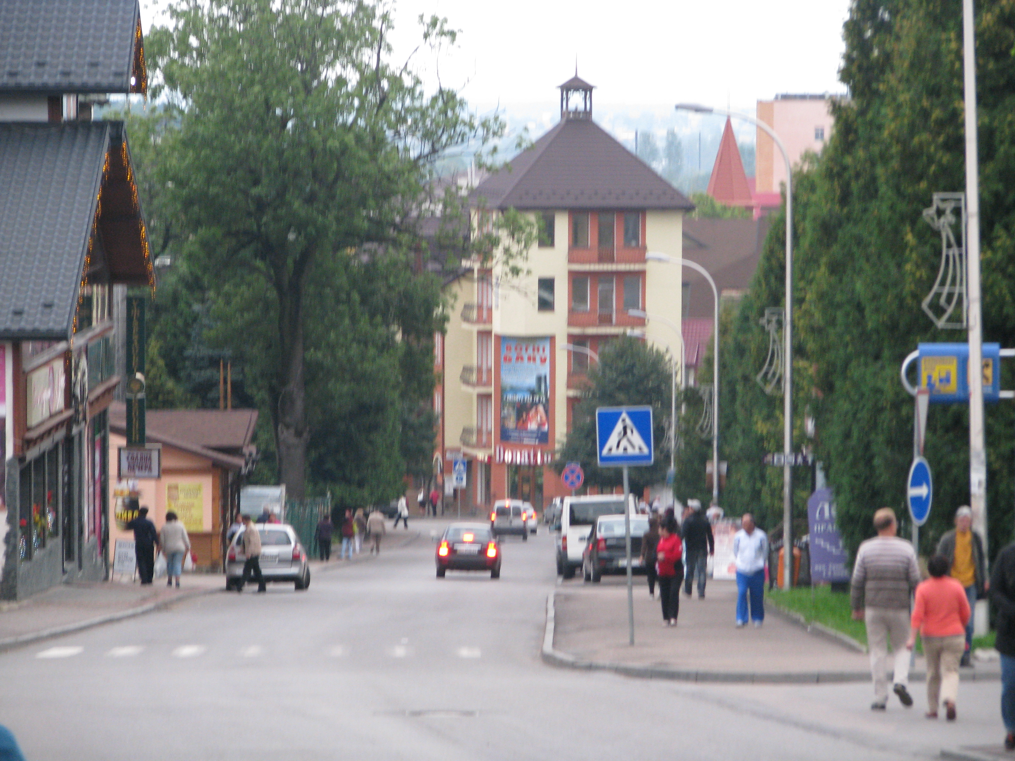 Труска